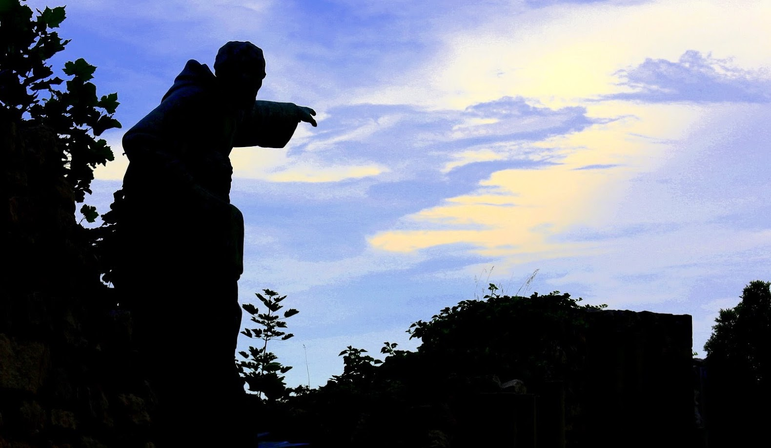 Julianus barát szobra naplementekor, Antal Károly: Gellért és Julianus barát szobra a budai várban részlet